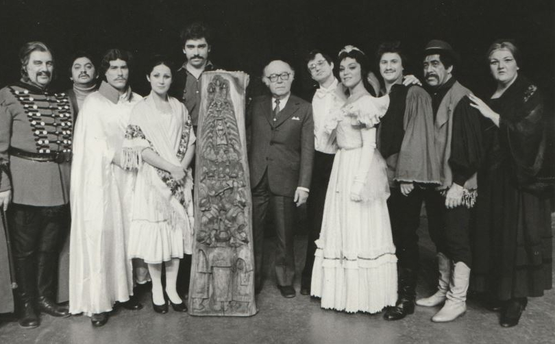 Balról jobbra Domahidy László, Csemer Géza, Ifj. Palcsó Sándor, Pitti Kati, Lukács László, Farkas Ferenc, Dénes István, Kukely Júlia, Maros Gábor, Mucsi Sándor, Farkas Éva